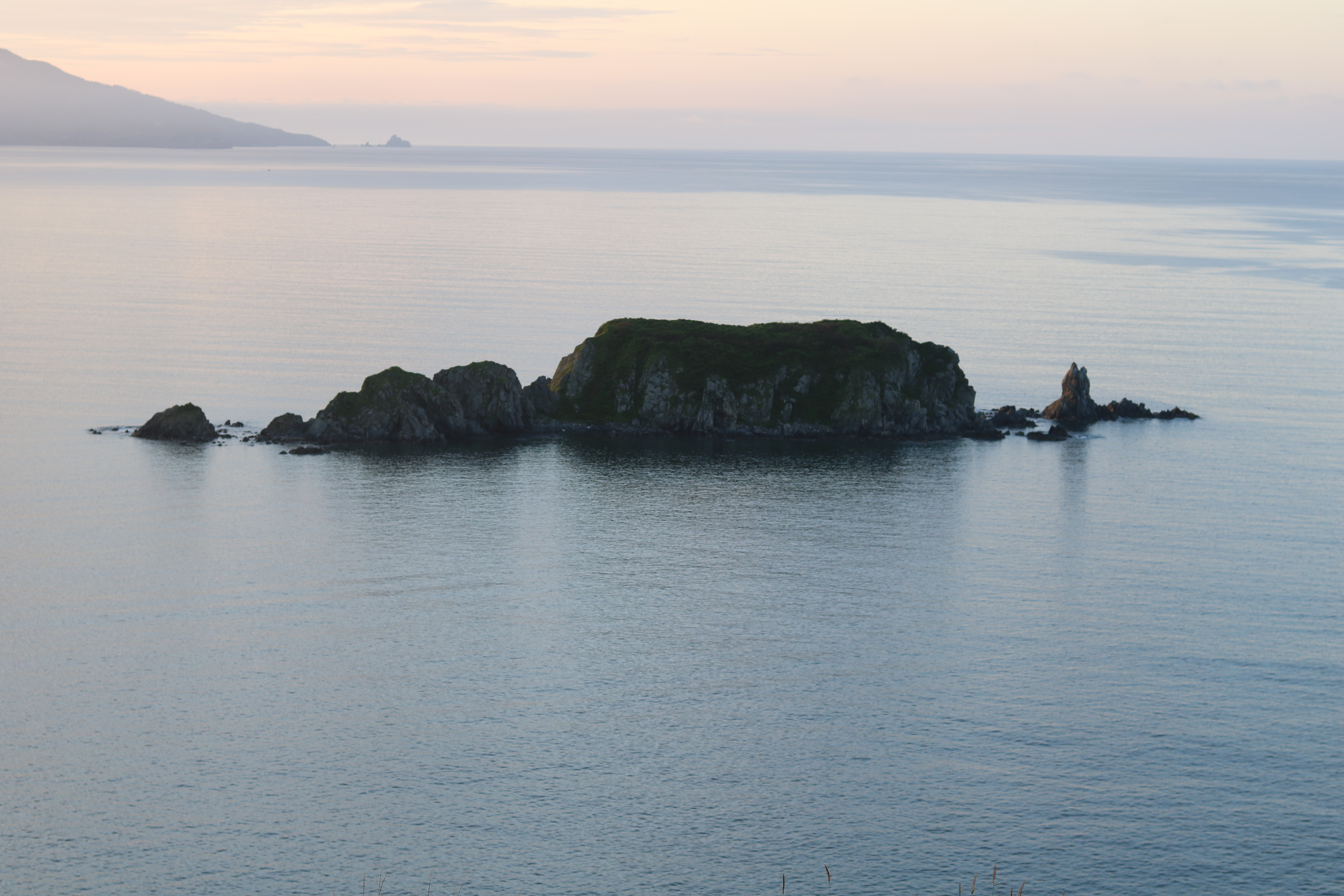 Остров Михельсона летним утром. Вид с возвышенности, под прямым углом к продольной оси острова.